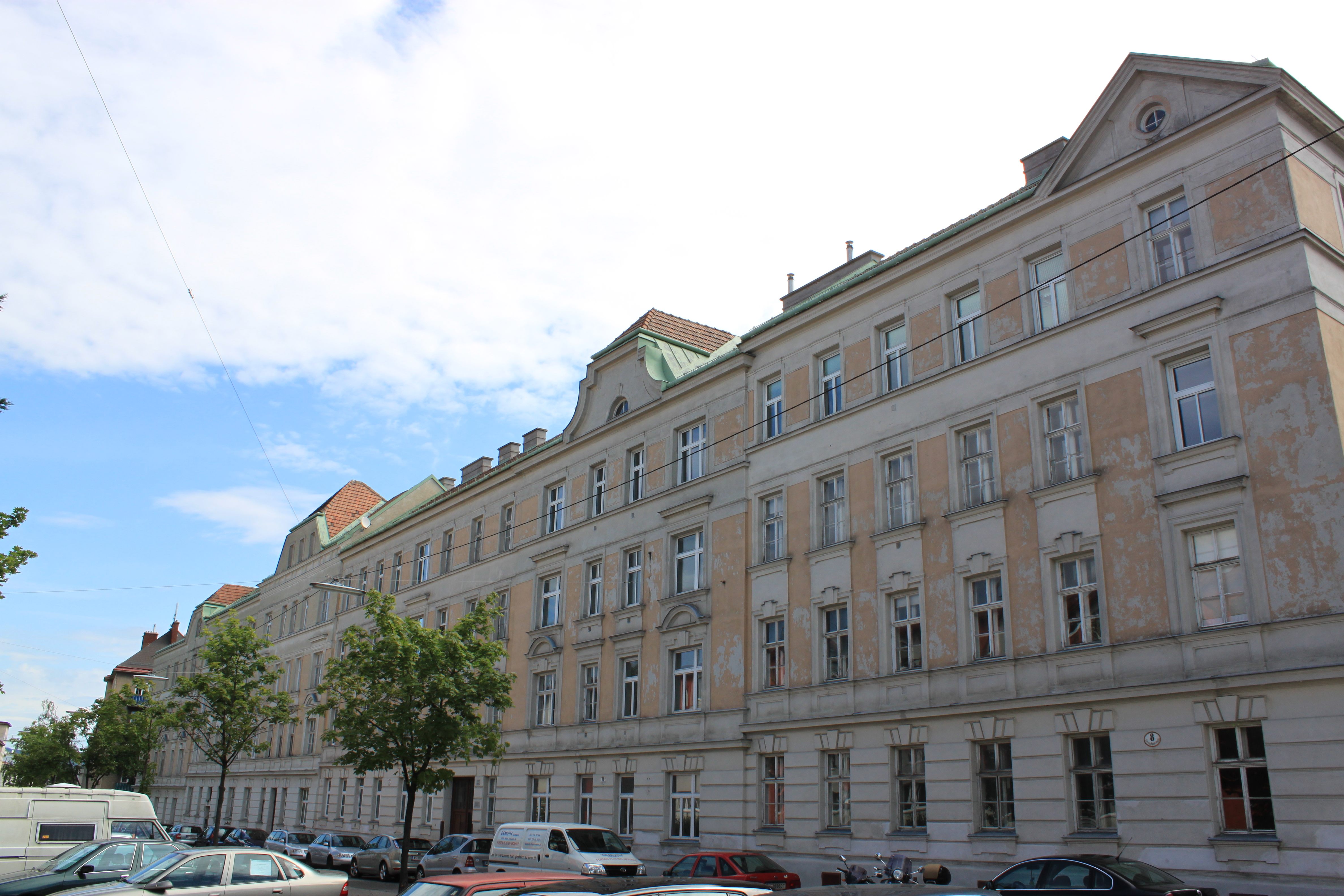 Lobmeyrhof, Lorenz Mandl-Gasse 10-16, 1160 Wien